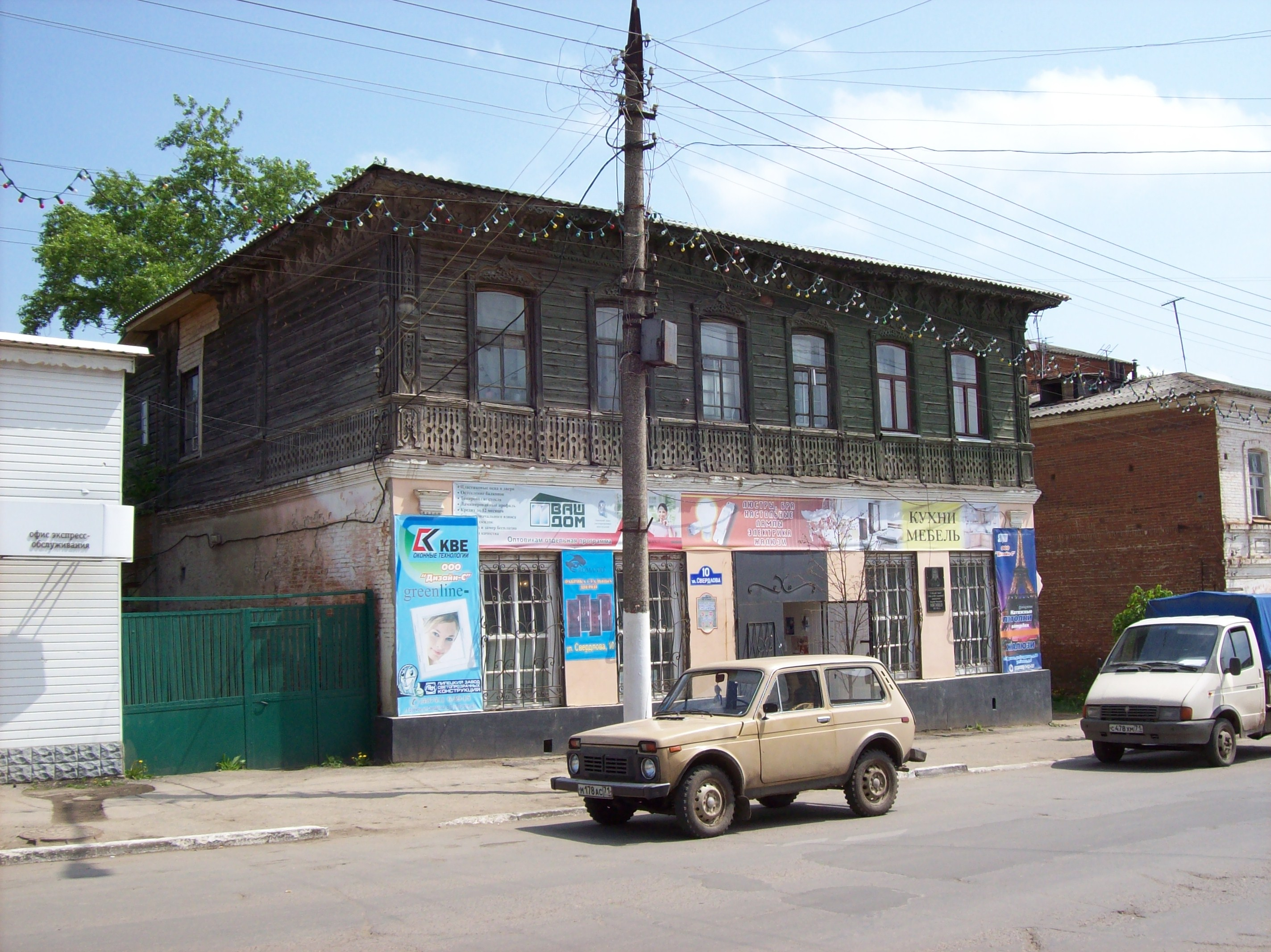 Ефремов, дом Мясищева.